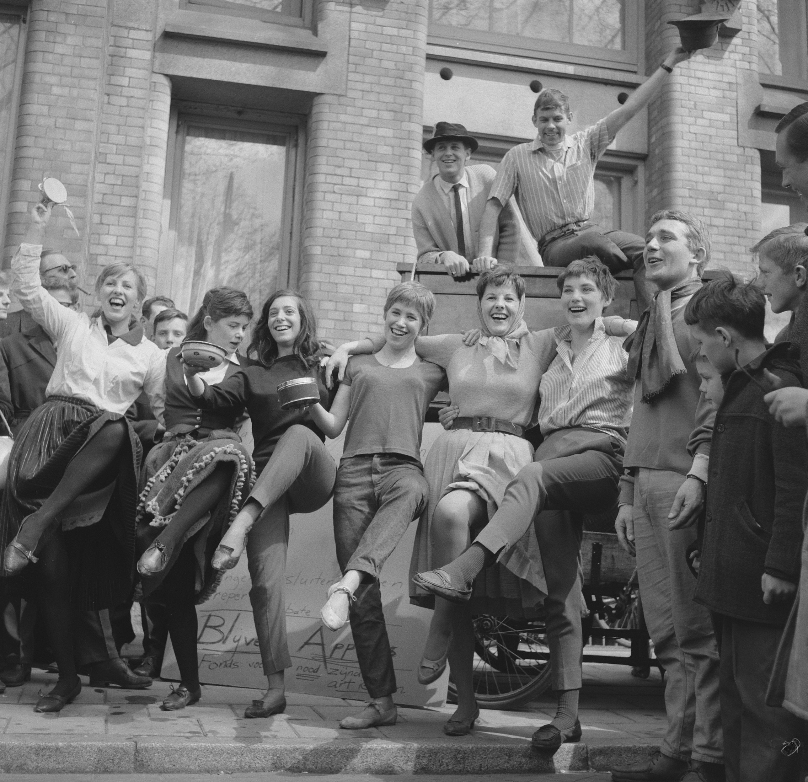 Collectie / Archief : Fotocollectie Anefo Reportage / Serie : [ onbekend ] Beschrijving : A.B.C. Cabaret (opdracht De Telegraaf) Datum : 30 april 1962 Trefwoorden : cabaret, cabaretiers Instellingsnaam : Telegraaf Fotograaf : Gelderen, Hugo van / Anefo Auteursrechthebbende : Nationaal Archief Materiaalsoort : Negatief (zwart/wit) Nummer archiefinventaris : bekijk toegang 2.24.01.03 Bestanddeelnummer : 913-8257 Reacties Geplaatst door Maaike op 13 maart 2014 - 18:09. Programma 'Herexamen' wordt gepresenteerd op de terrassen rond het Leidseplein v.l.n.r. Nelly Wiegel, Philippine Aeckerlin, Eva Gosler, Jenny Arean, Maya Bouma, Annelies Bouma, Henk Elsink Bovenste rij: René Frank, Jaco van Renesse Plaats: Amsterdam, Noord-Holland